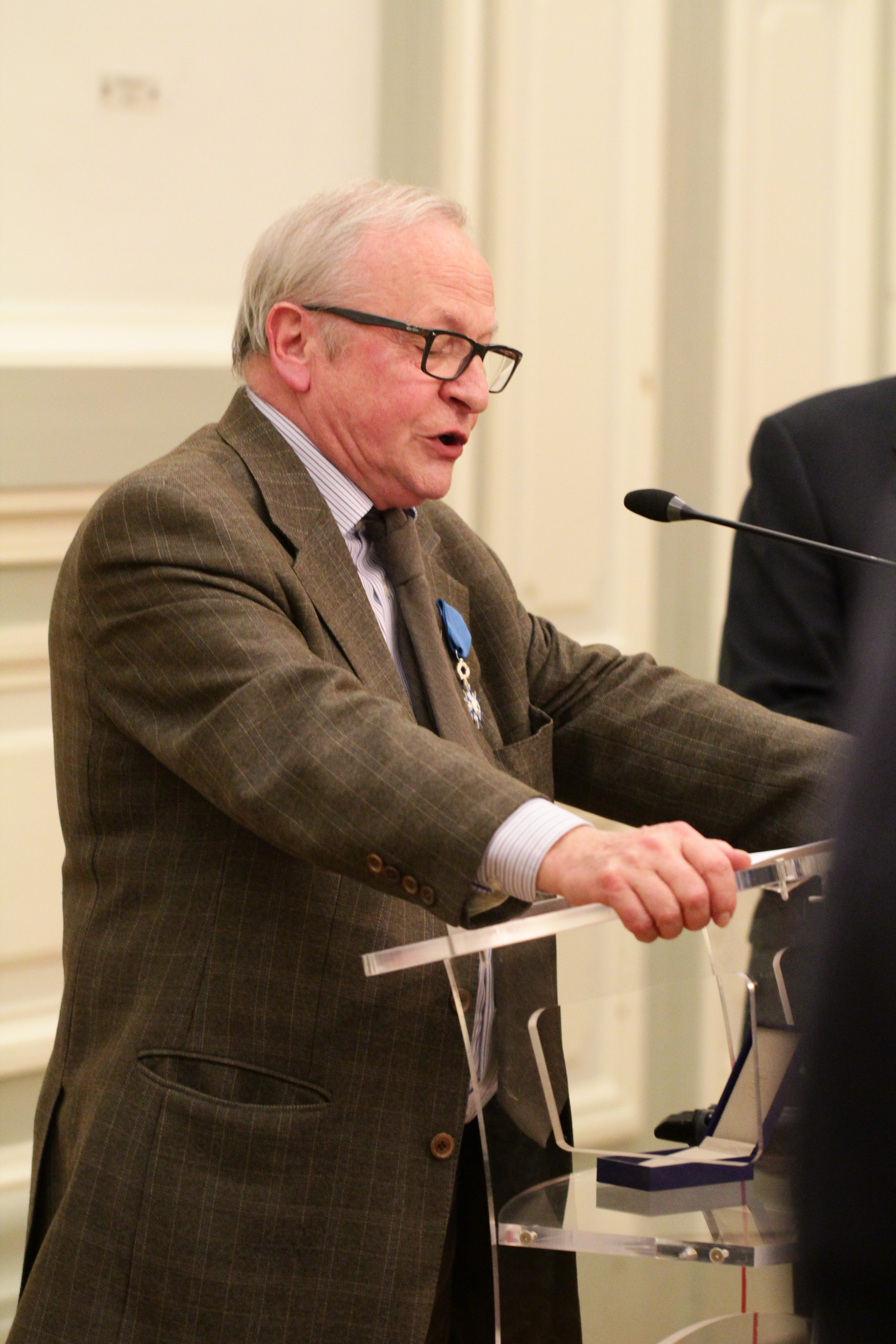 Georges Sorel lors de la cérémonie de l'ordre du mérite national